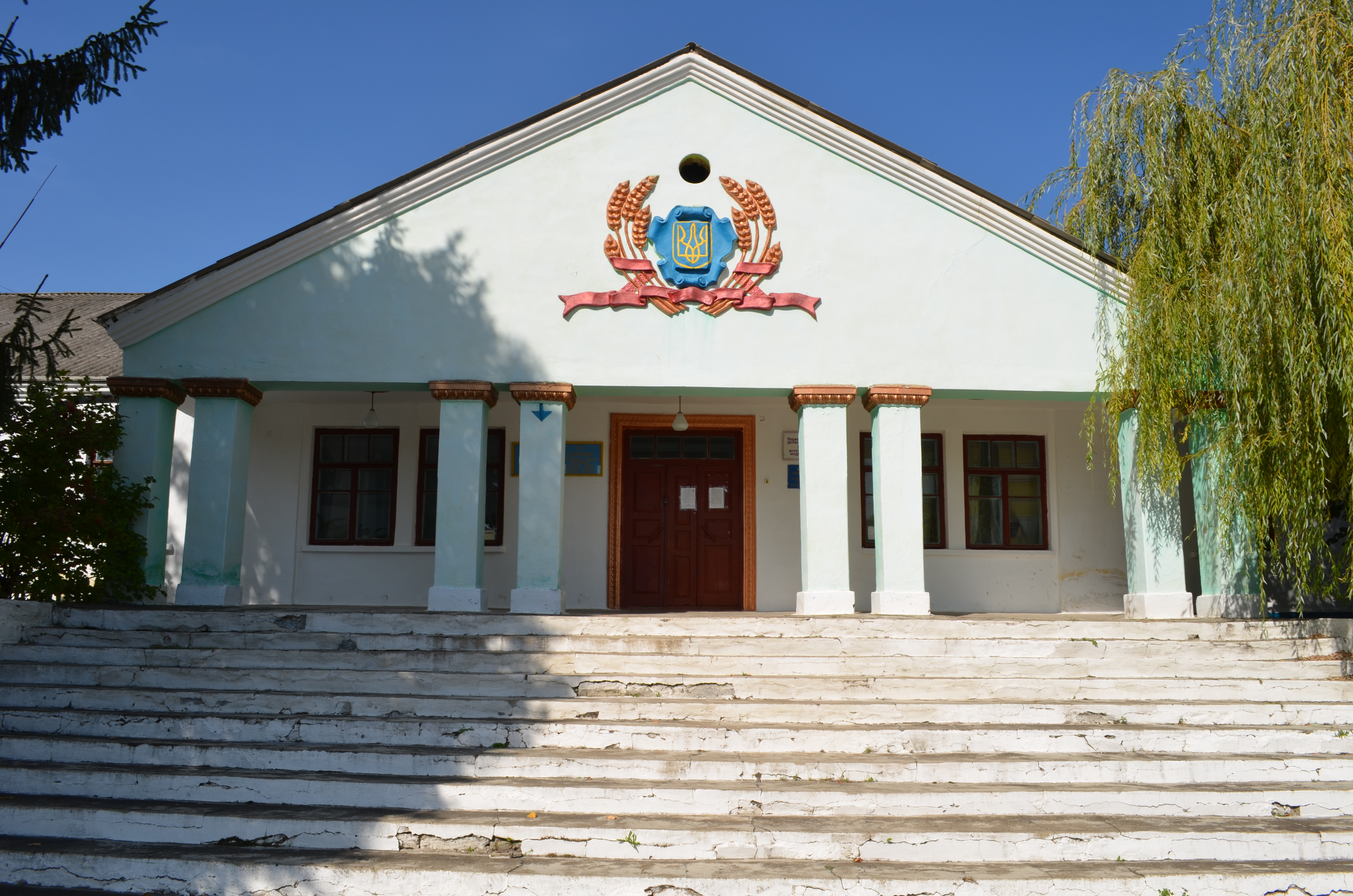 с. Болган. Сільська рада.